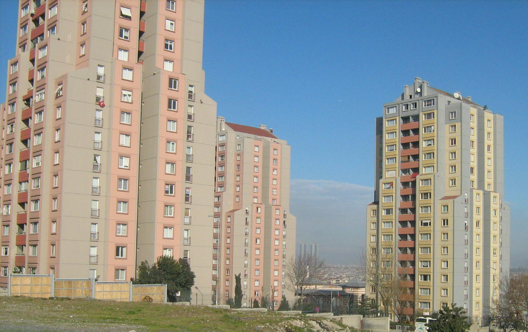 Bu resim tarafımdan çekilmiştir.